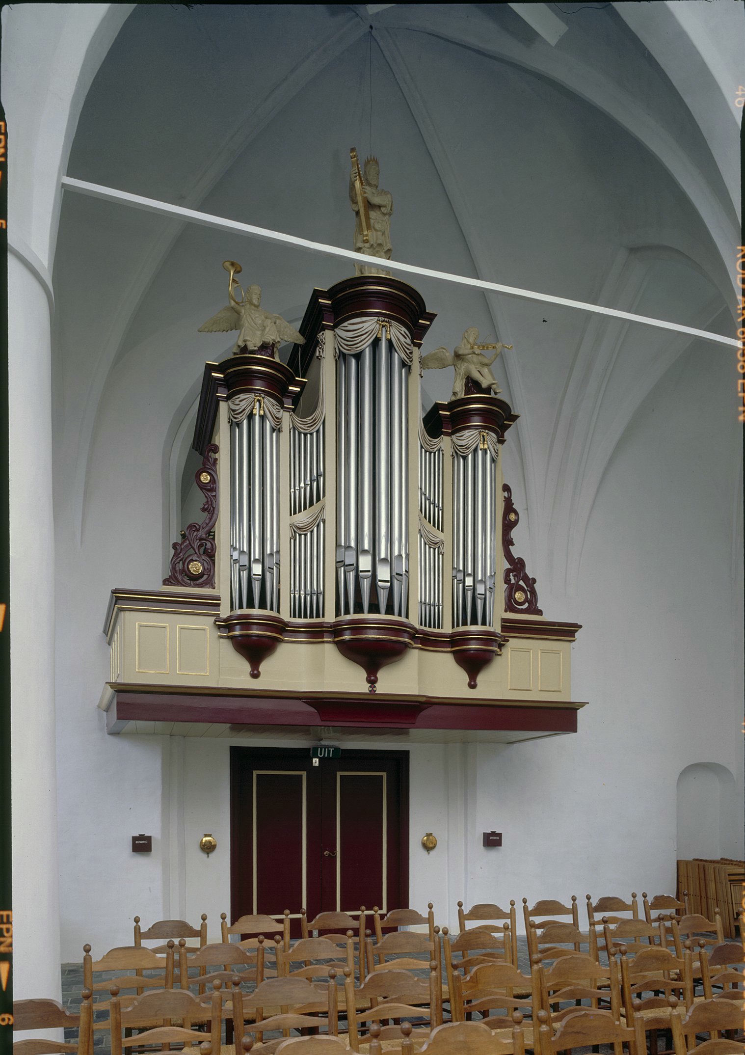 Nederlands Hervormde Kerk: Interieur, aanzicht orgel, orgelnummer 1365 (opmerking: Gefotografeerd voor Het Historische Orgel in Nederland 1840-1849)